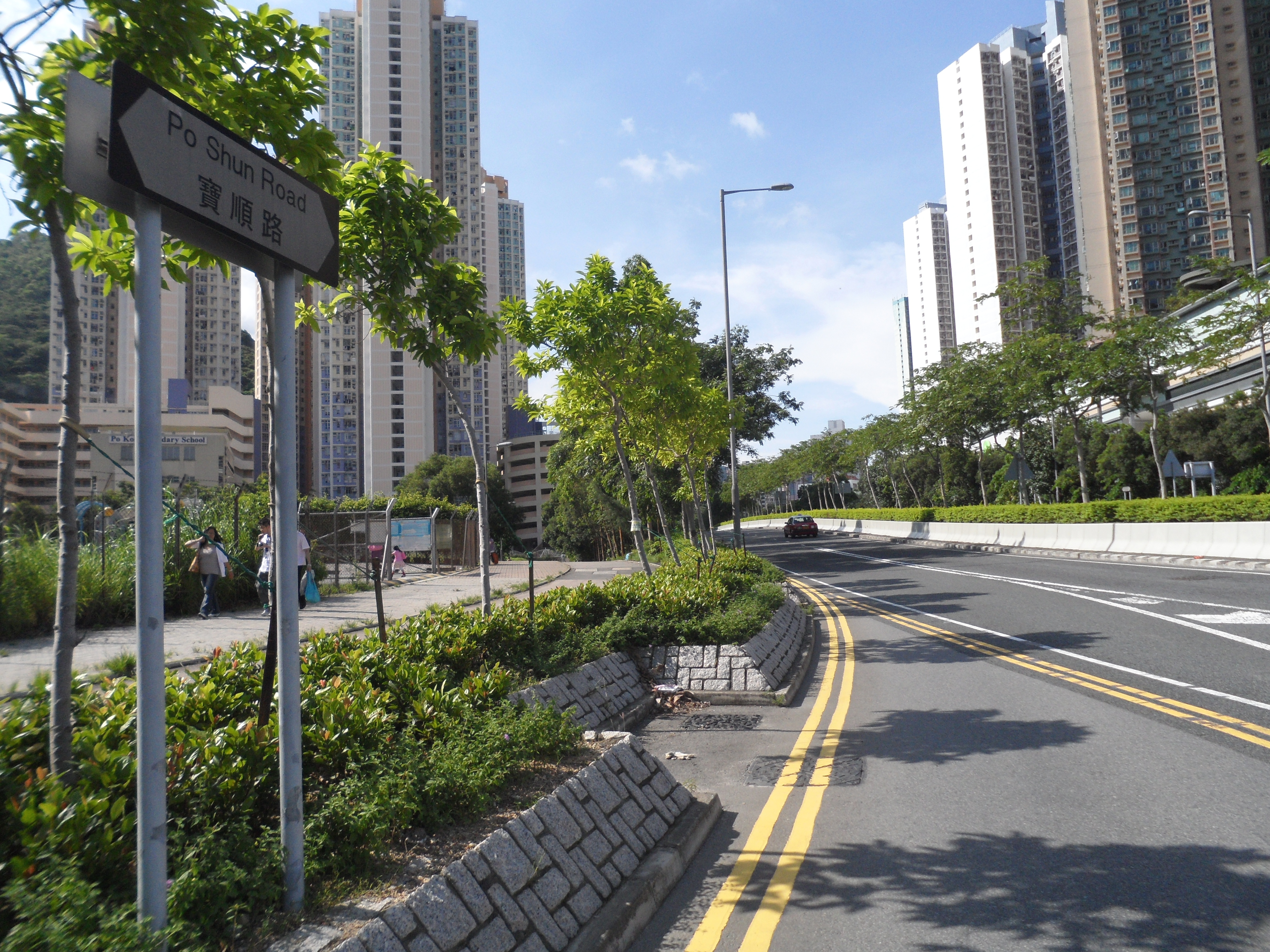 寶順路鄰近李惠利工業學院路段